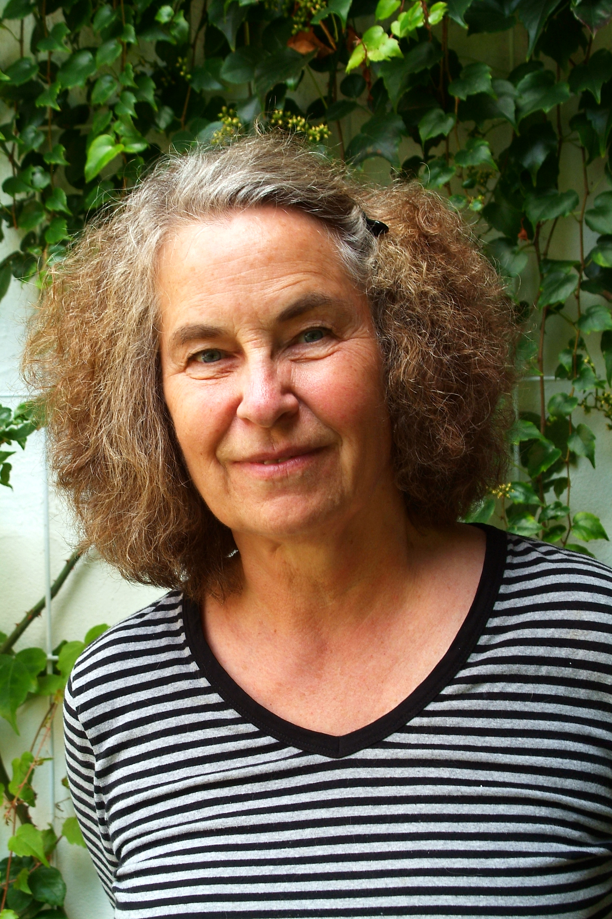 Die Künstlerin Ulrike Enders, ganz privat in ihrem Garten ...